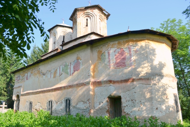 Biserica „Sf. Împărați” a fostei mănăstiri a Cuțuieștilor, sat Broșteni; comuna Broșteni La intrarea în sat, la 300 m de culă 1836